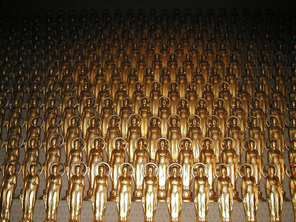 法堂内に安置される千躰地蔵